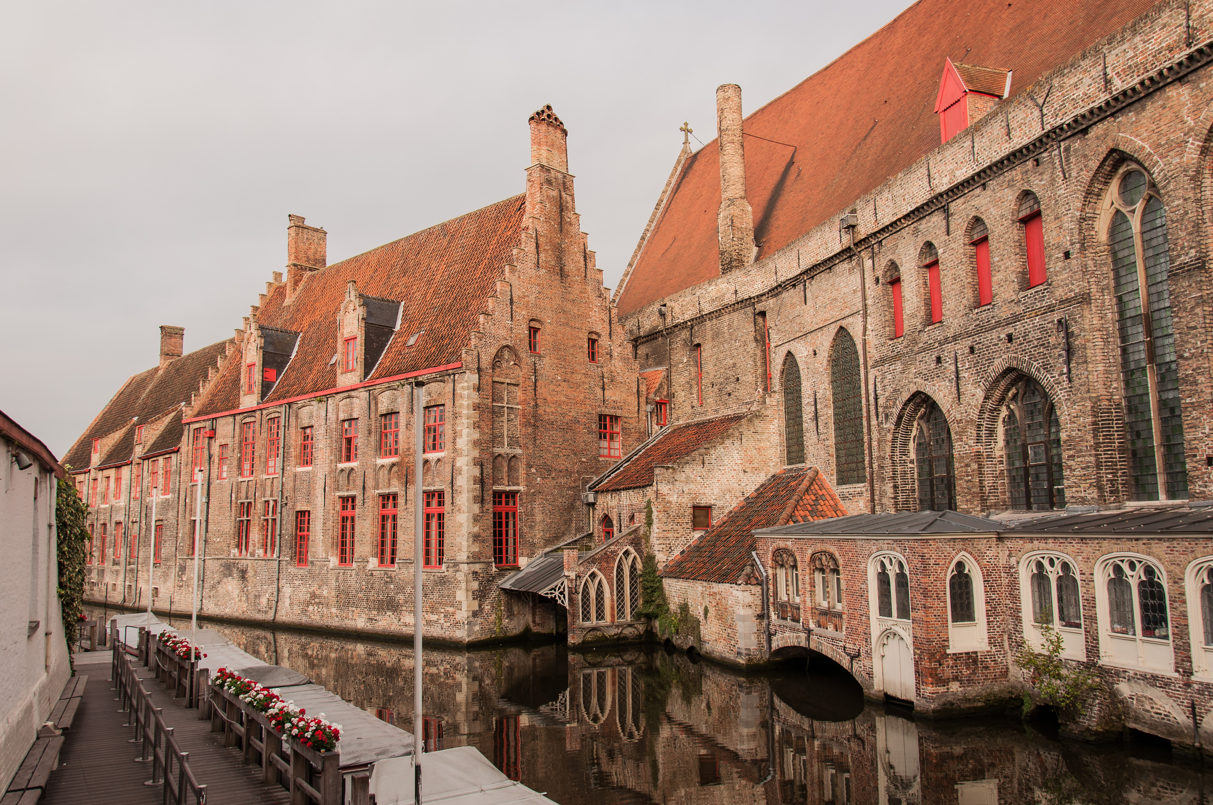 Zicht op de zuidgevel van het Middeleeuws oud Sint-Jans hospitaal. Nu museum. Het Sint-Janshospitaal is een van de oudst bewaarde hospitaalgebouwen van Europa. In het museum kom je meer te weten over het vroegere hospitaalleven en hoe de ziekenzalen er toen uit zagen. Meubels, schilderijen, beelden, zilverwerk en tinnen voorwerpen zijn de stille getuigen van eeuwenlange zieken- en zielszorg in dit hospitaal. Uniek is ook het dakgebinte van het gebouw, dat tot de oudste en meest monumentale van Europa behoort